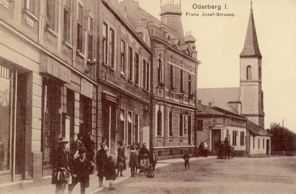 Bohumín, Hlavní třída